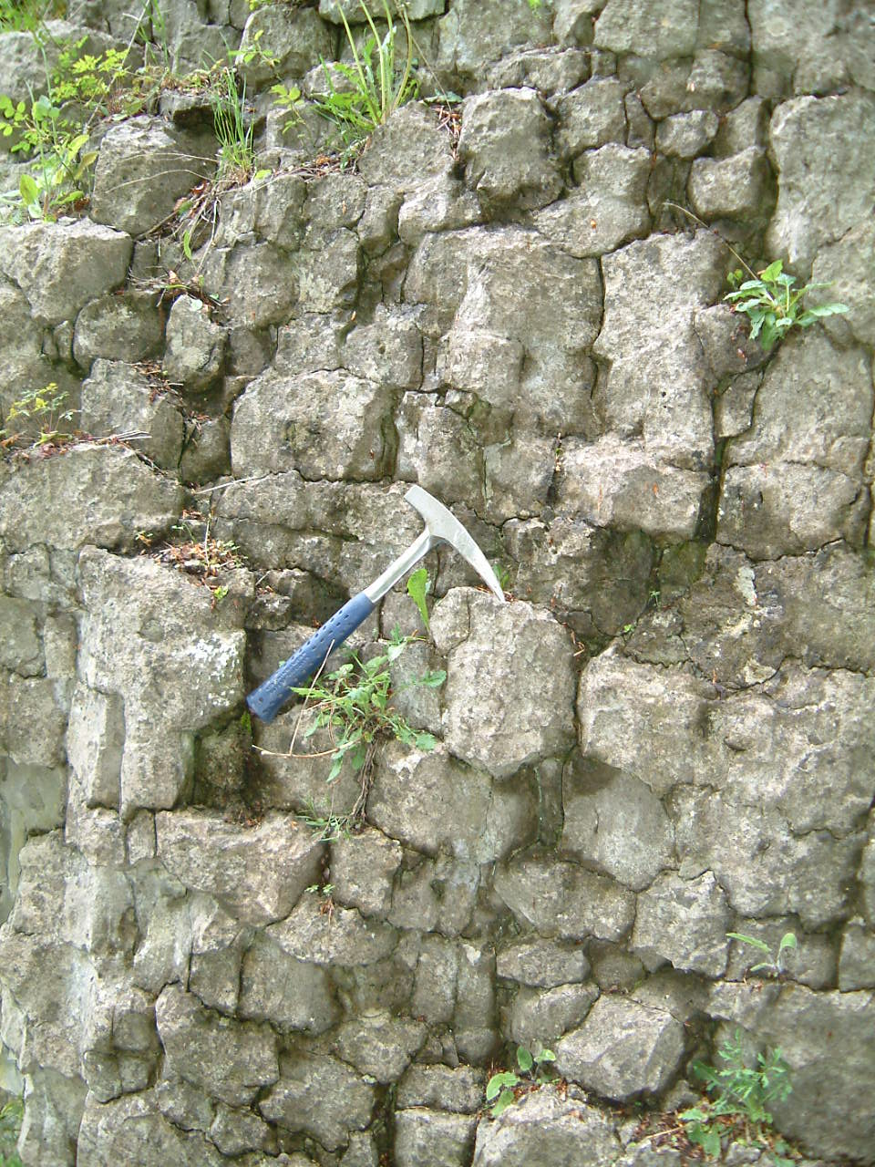 Werrakalk (Stinkkalk) unterhalb des Bielsteins (Bielstein (Teutoburger Wald)?)